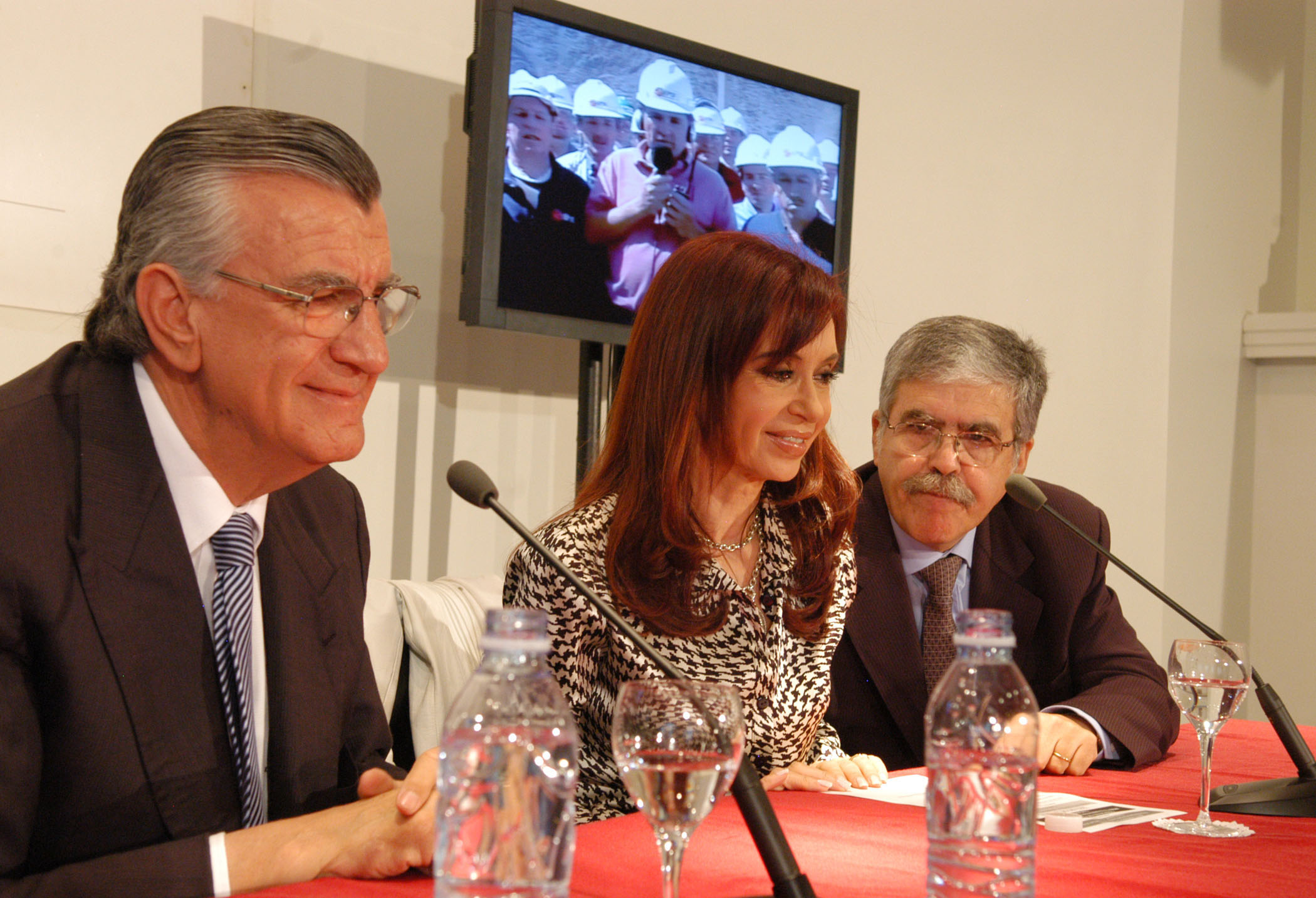 La presidenta Cristina Fernandez junto al gobernador de San Juan, José Luis Gioja, y el ministro de Planificación Federal, Julio De Vido